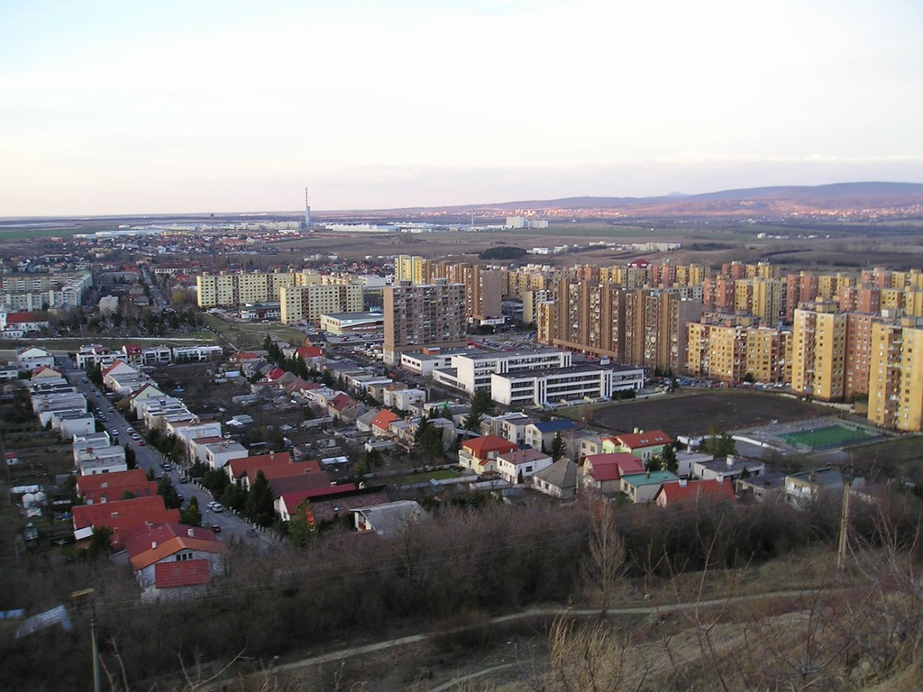 Pohľad na DNV zo Sandbergu